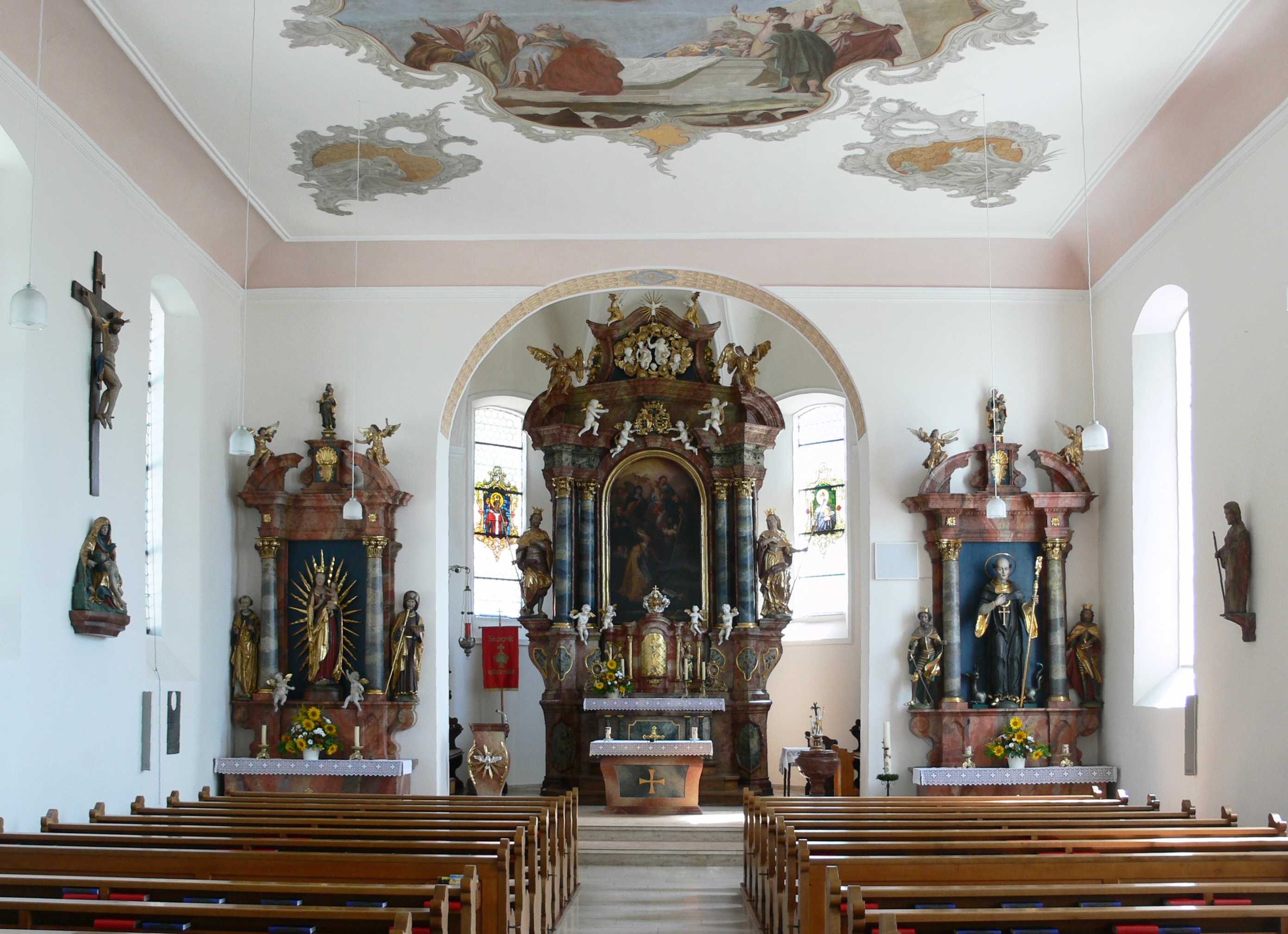 Pfarrkirche St. Magnus, Waldburg, Landkreis Ravensburg Innenansicht, Blick zum Chor